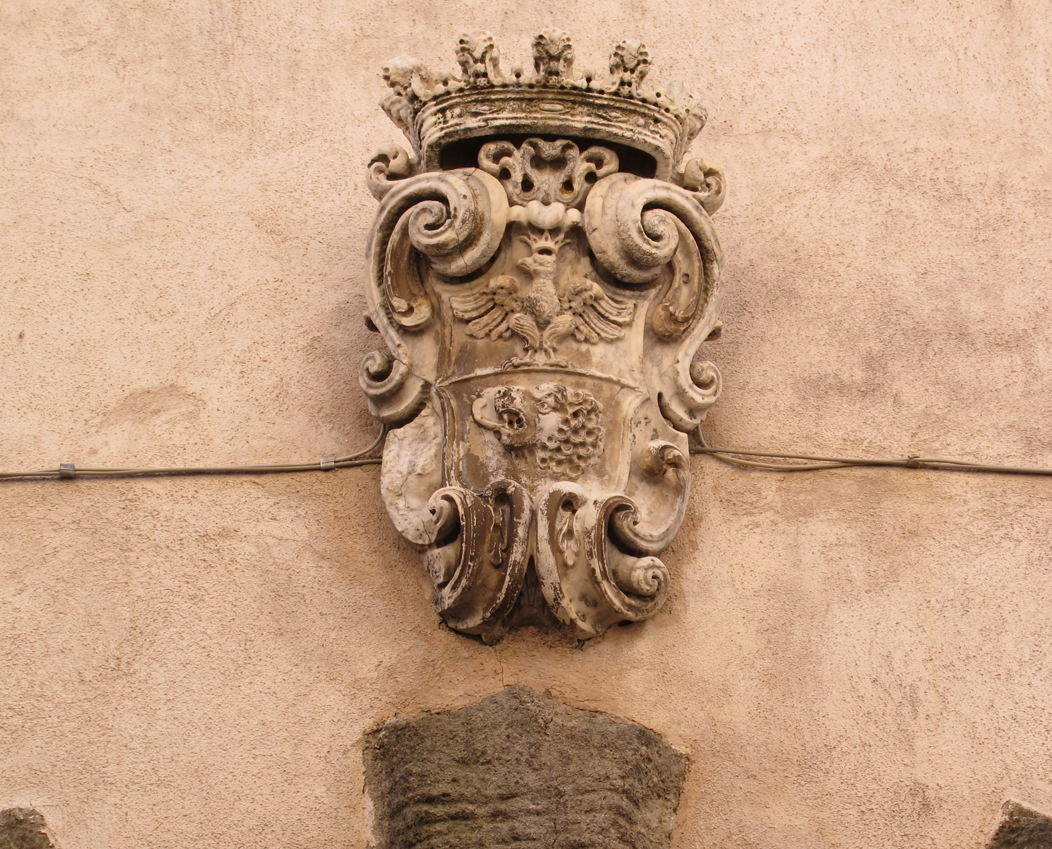 Roccalbegna, palazzo bichi ruspoli, xvii sec., 03 stemma